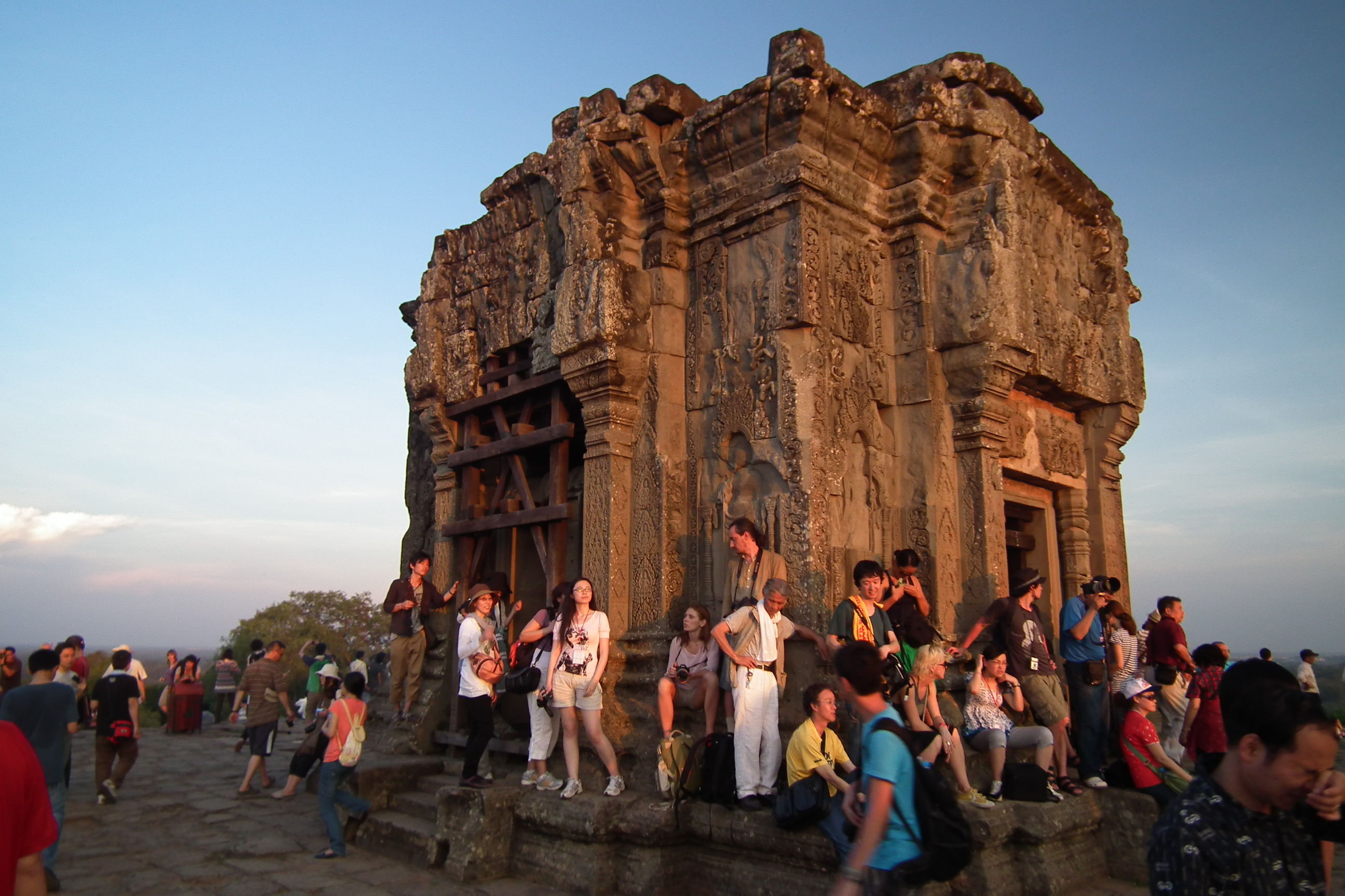 Angkor Phnom Bakheng アンコール・プノンバケン